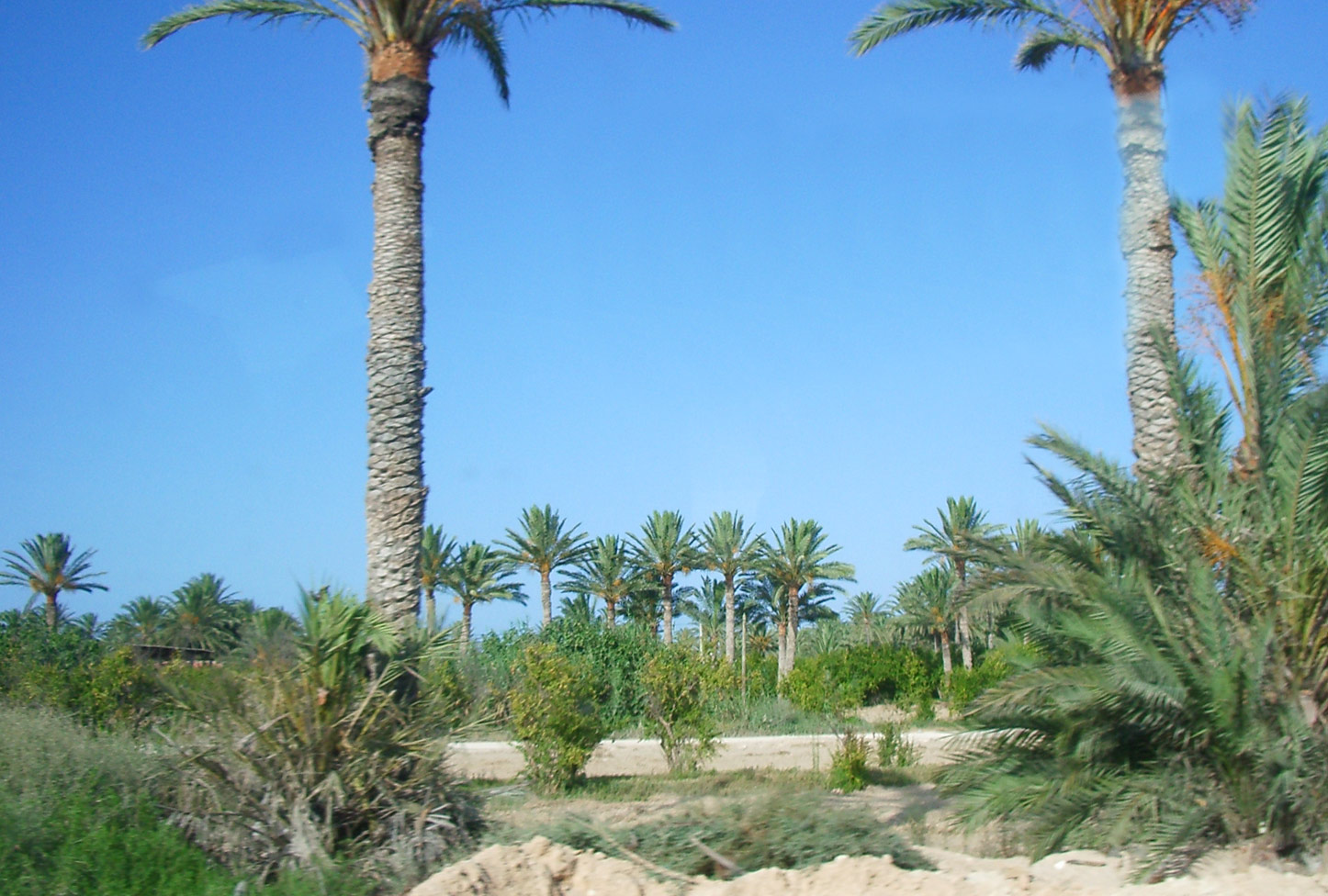 Parmerar de Gabès